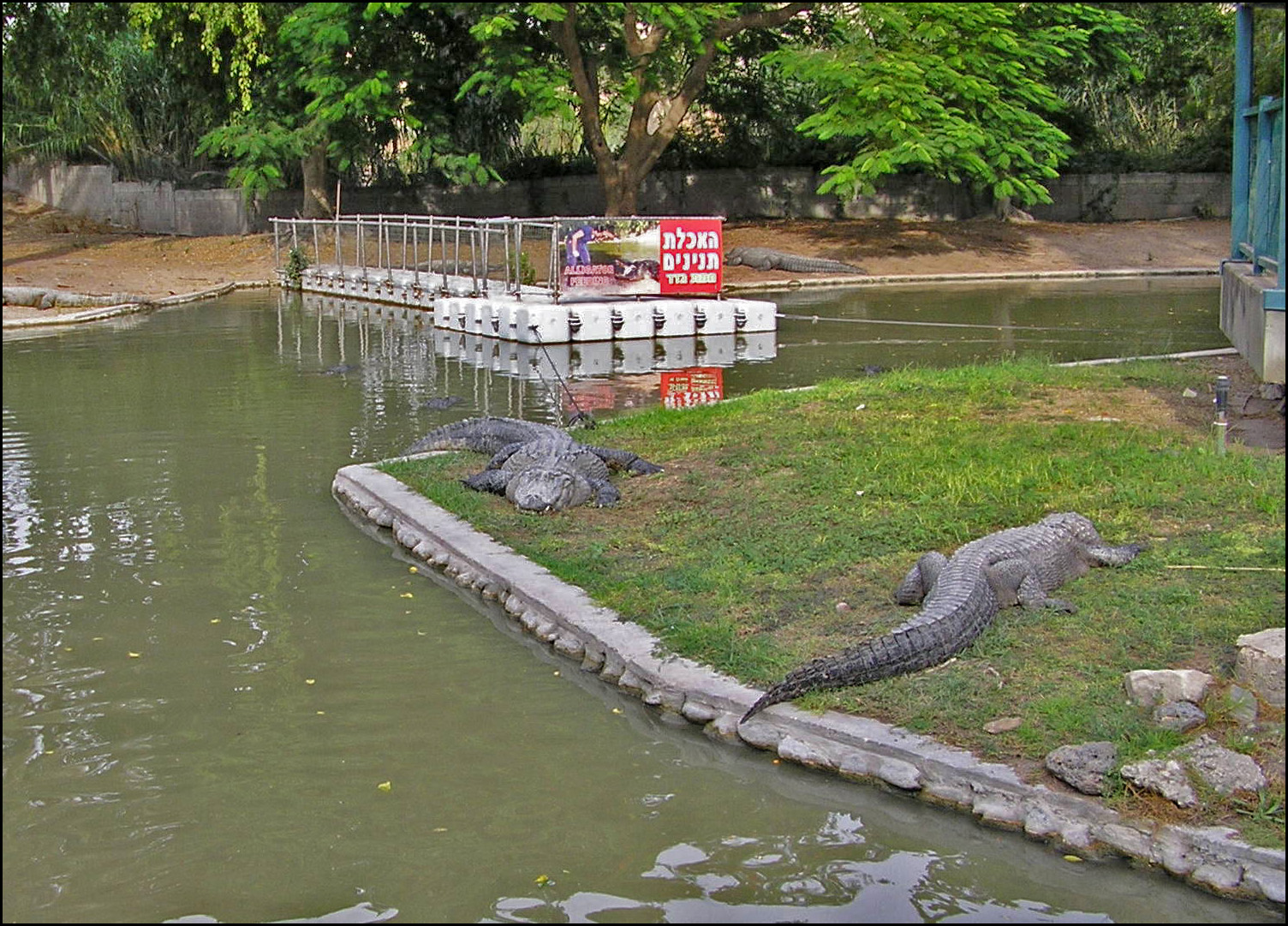 Hamat Gader (63).JPG